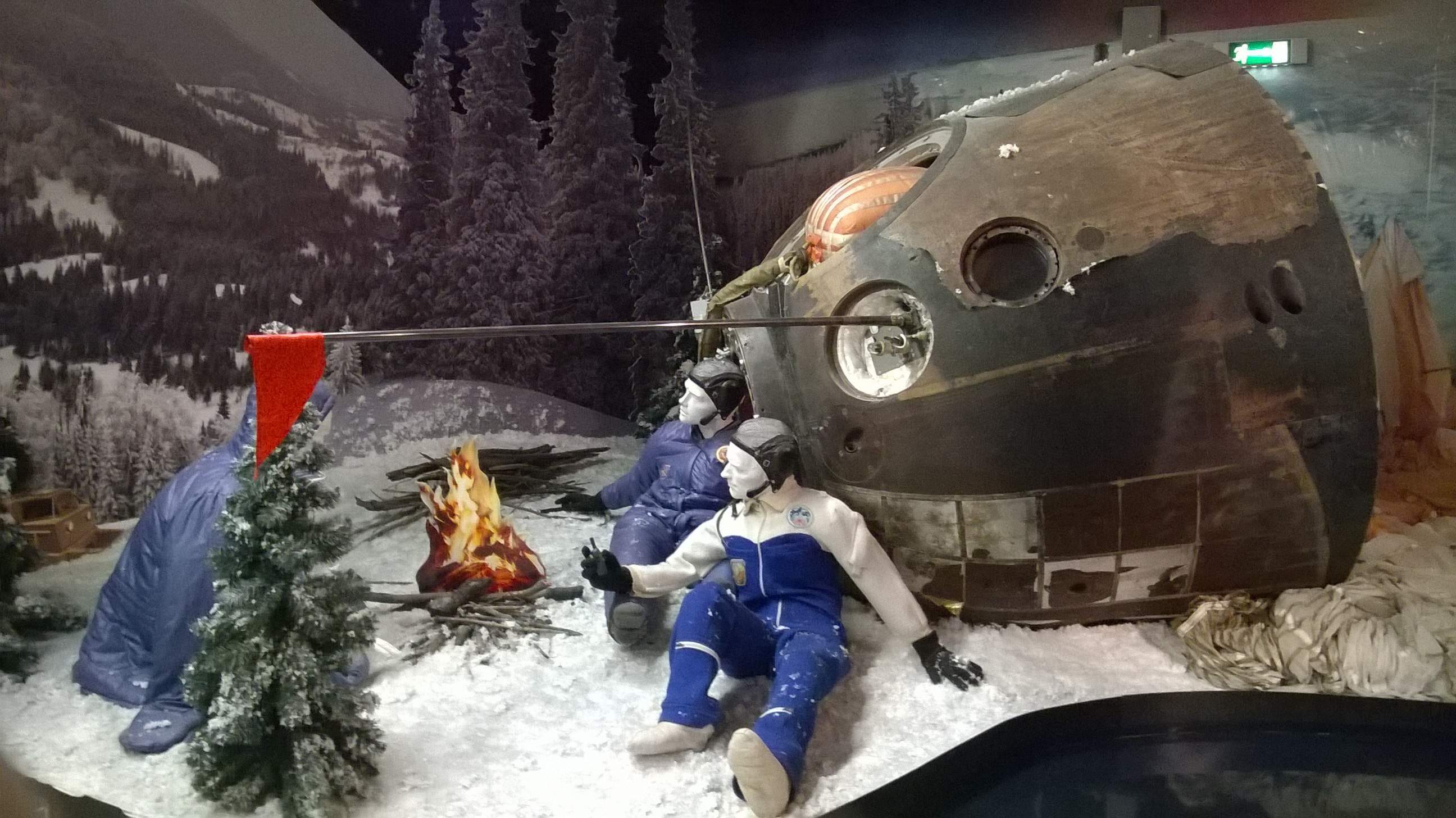 Спускаемый аппарат космического корабля «Союз ТМ-7»